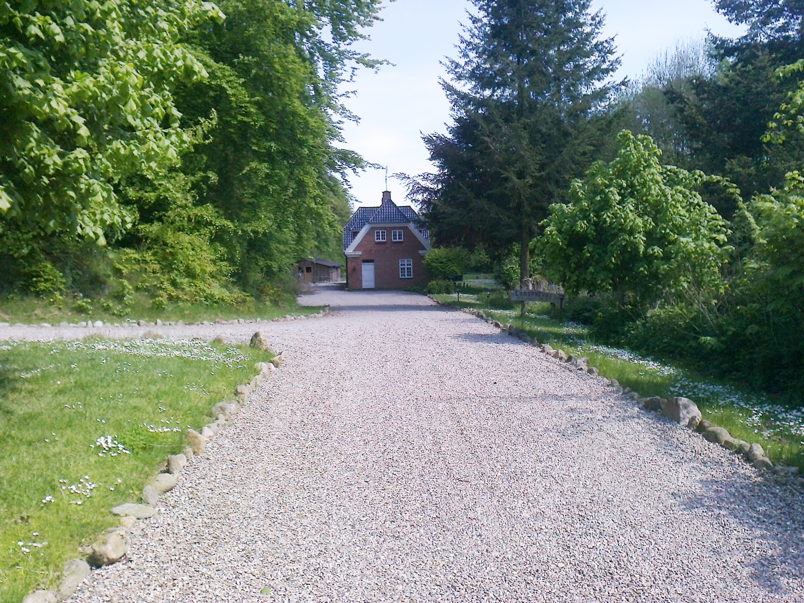 Langesø Station